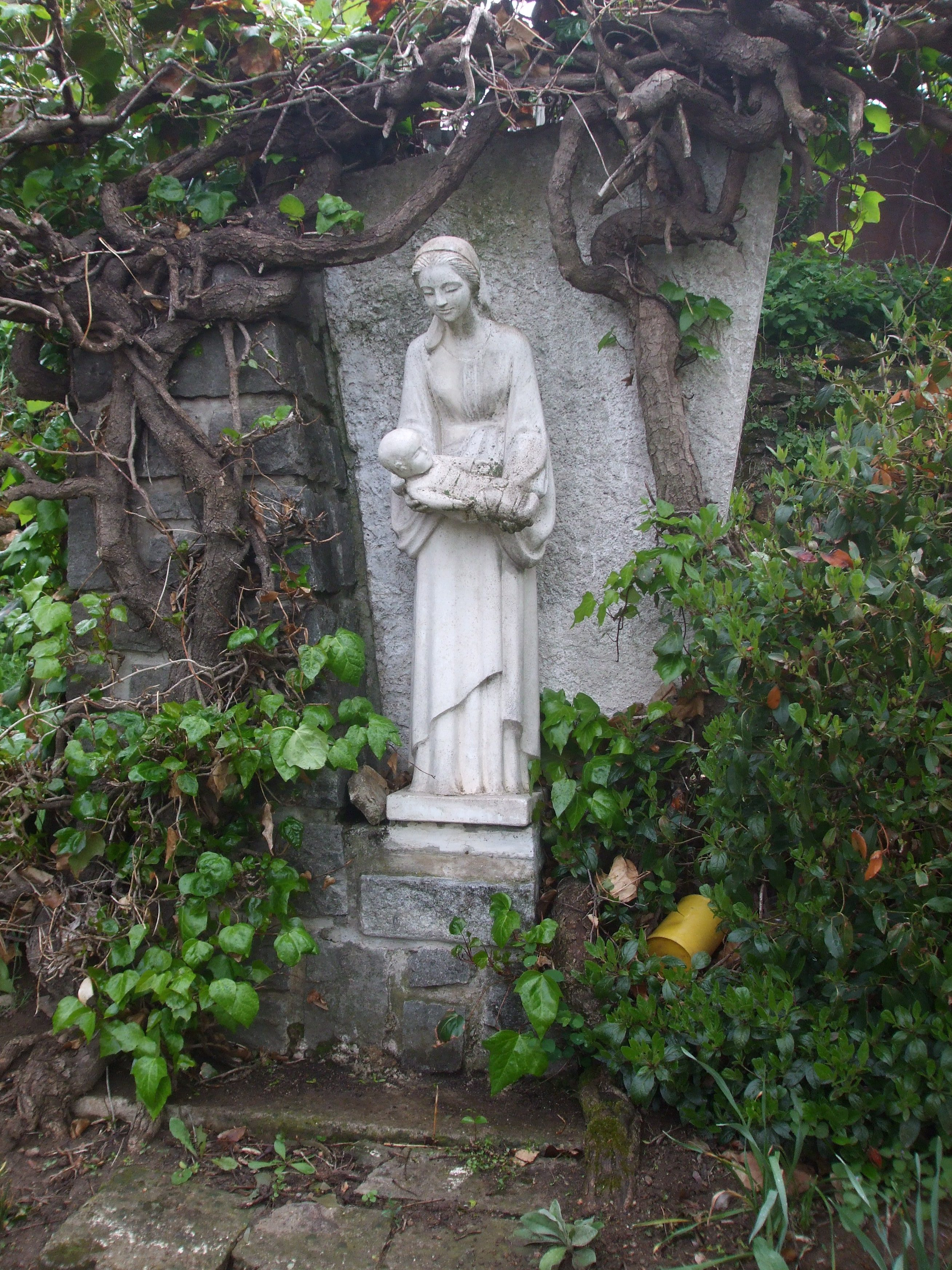 Vierge à l'enfant près de l'église de la Sainte Famille d'Annonay (Ardèche)